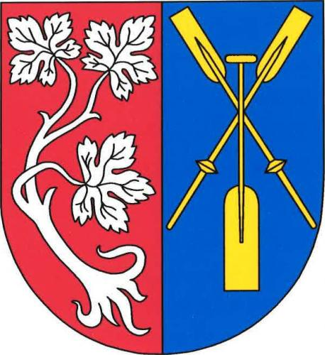 Znak, Račice, okres Litoměřice